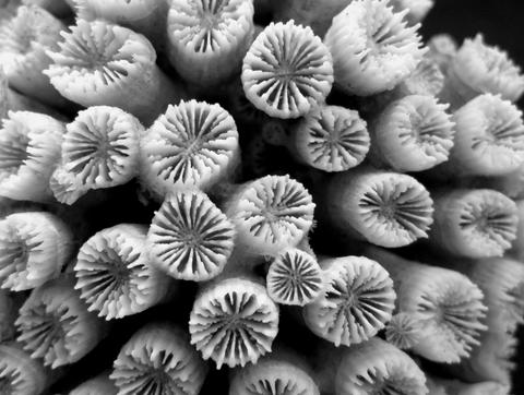 Blastomussa wellsi, disposición de coralitos en el corallum